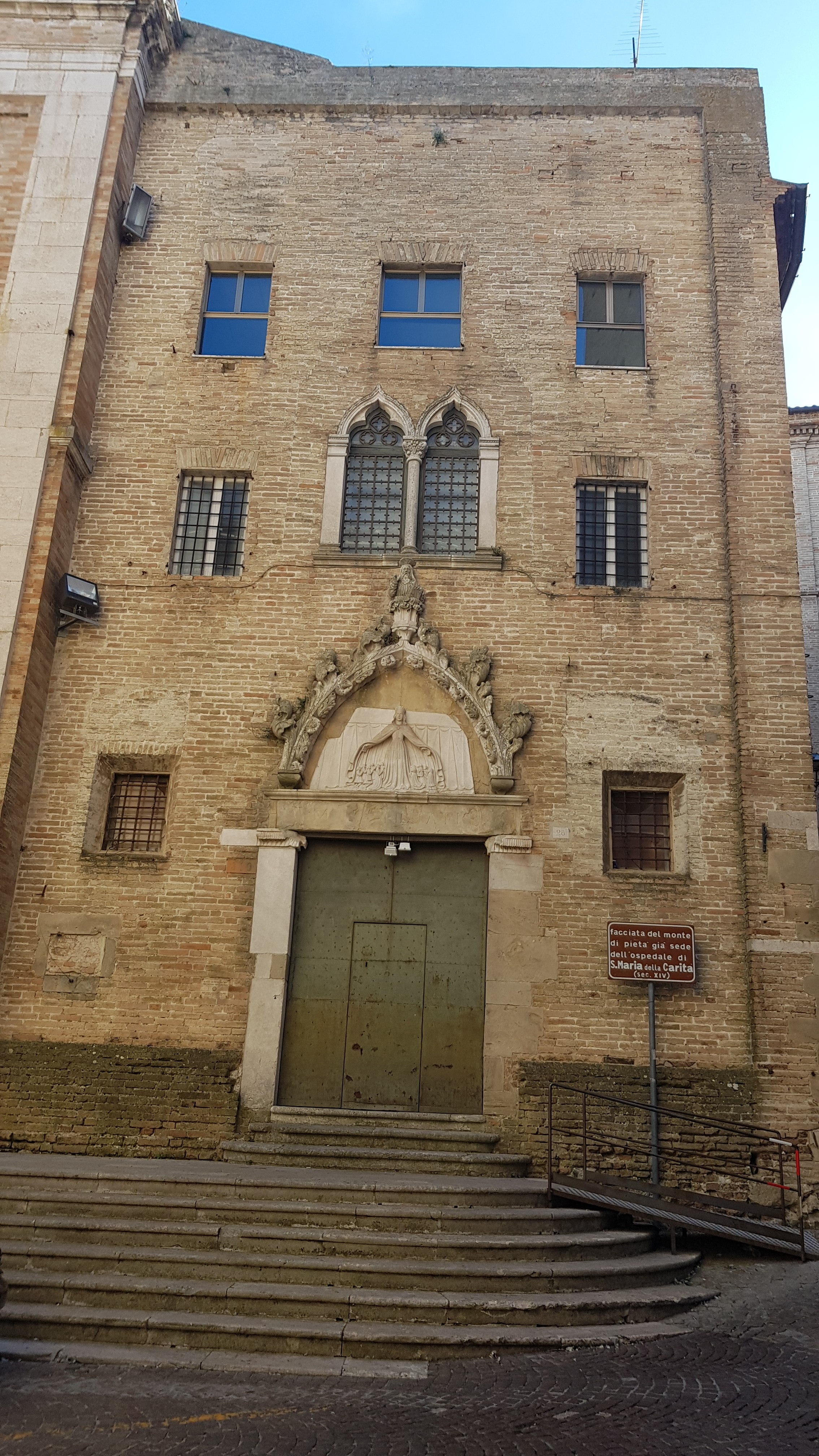 Di lato al Convento dei Carmelitani, attaccato alla facciata della chiesa del Carmine, ecco il palazzo del Monte di Pietà di Fermo, edificio di epoca medievale la cui facciata, negli archi acuti del portale (di Marino di Marco Cedrino) e delle bifore, reca gli elementi architettonici originari This is a photo of a monument which is part of cultural heritage of Italy.